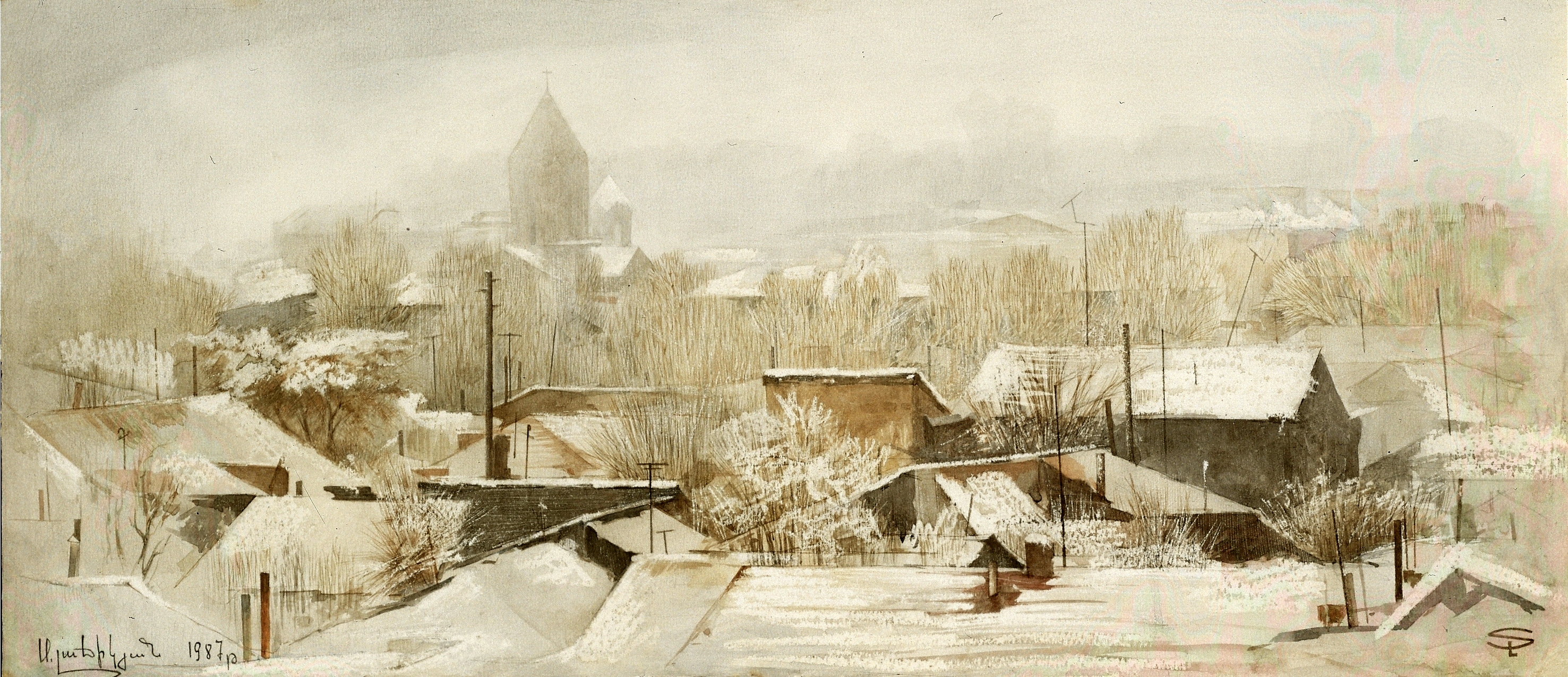 Լենինական, Ձմեռ, թուղթ, ջրաներկ, 21 X 47 սմ, գեղանկարիչ` Սամվել Լաճիկյան